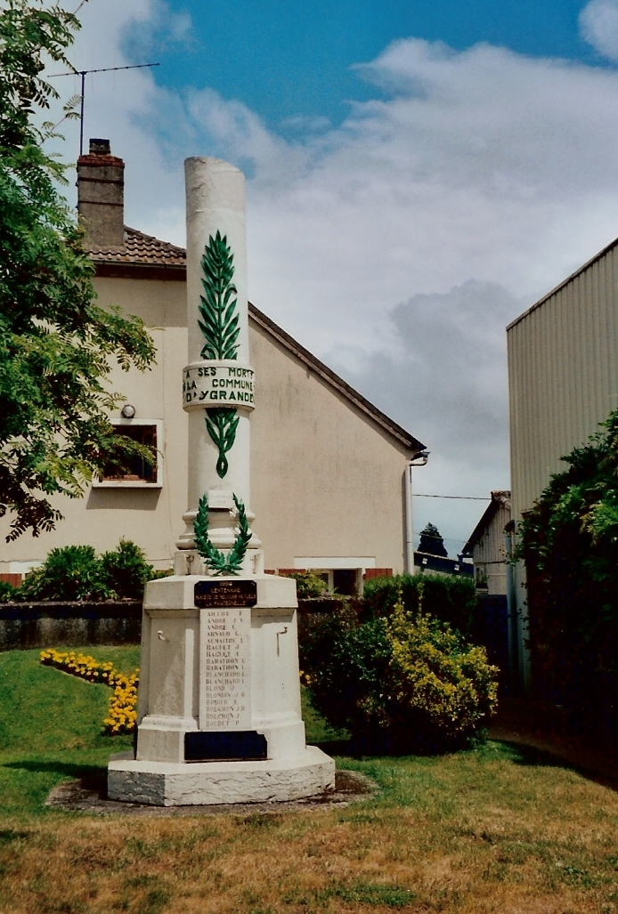 Photo personnelle